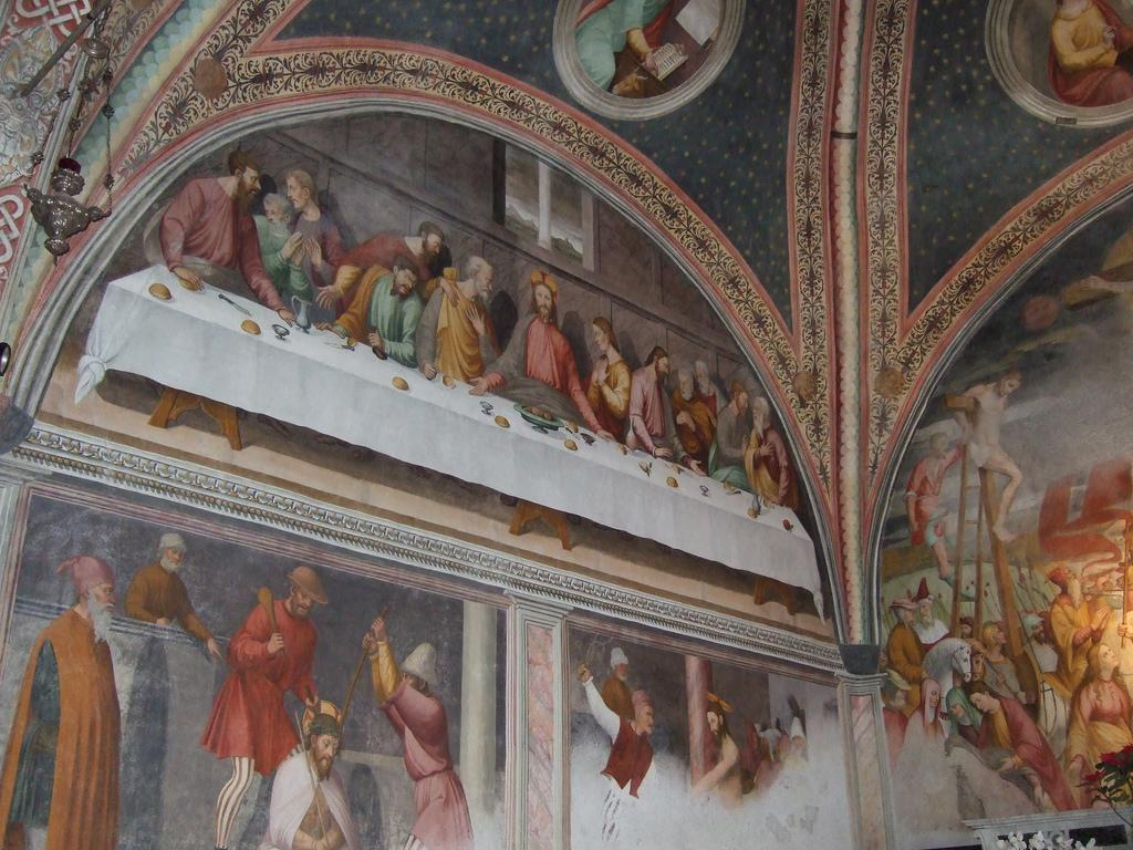 Interno del santuario di Nostra Signora delle Grazie, Chiavari, Liguria, Italia